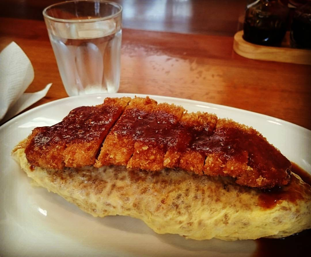 武生名物ボルガライス！カツ on オムライス！